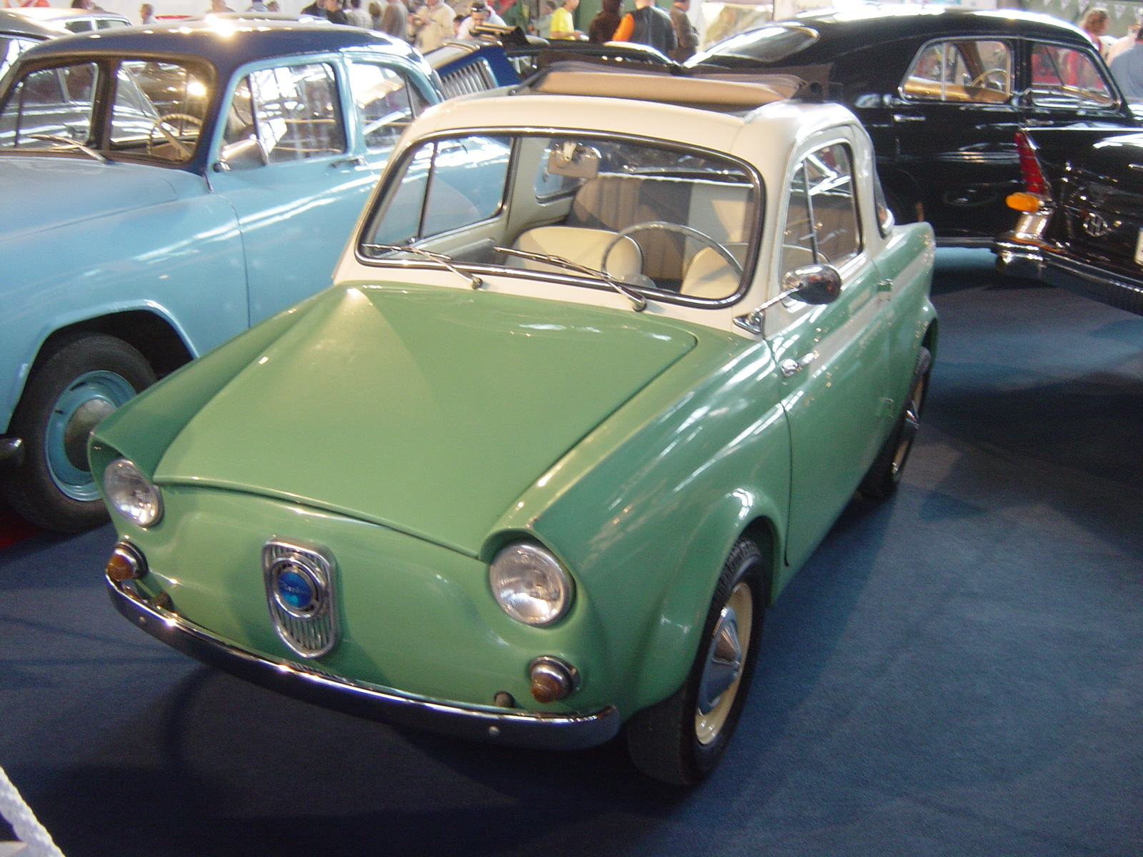 1962 NSU-Fiat Weinsberg 500